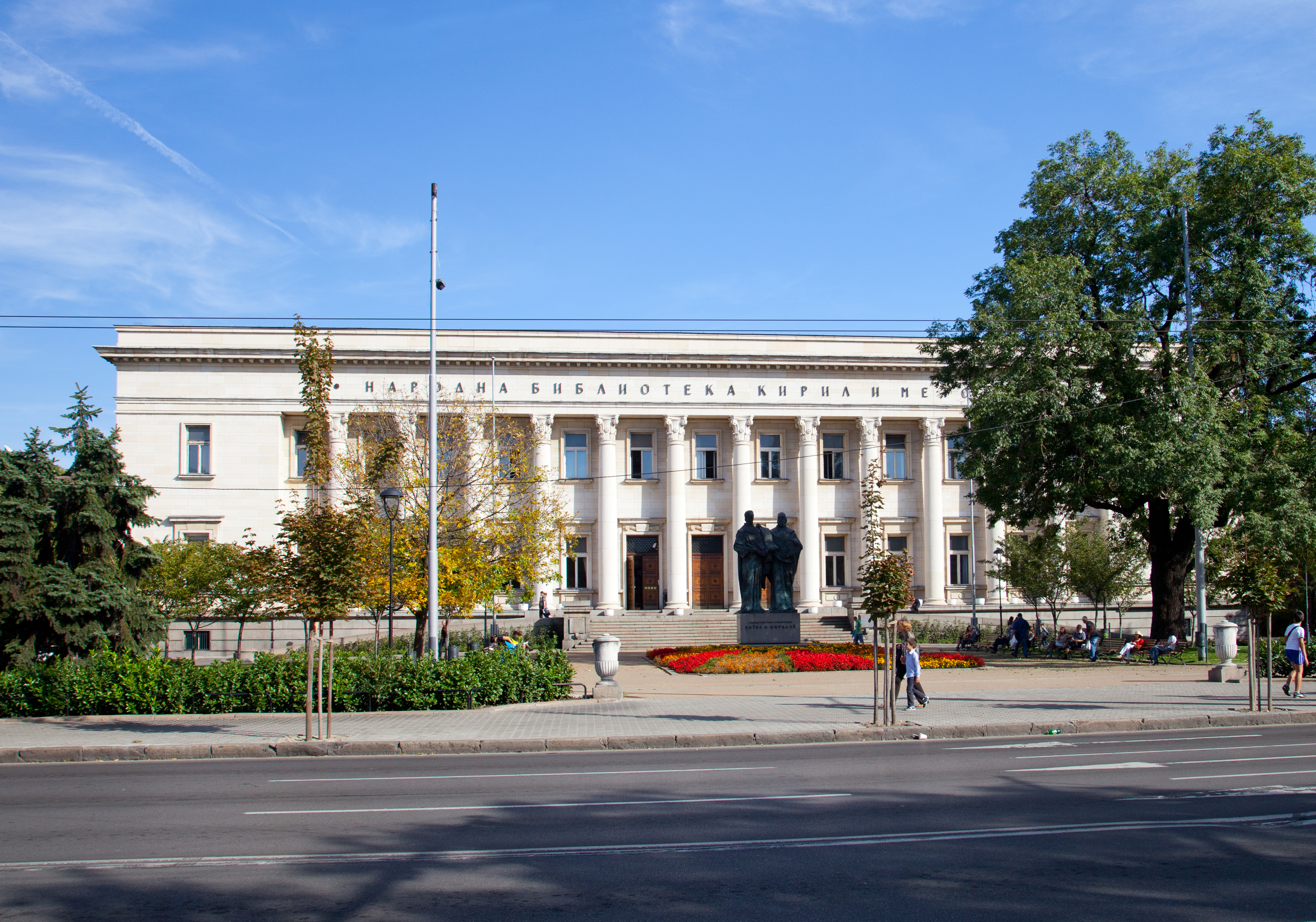 Sofia; Nationalbibliothek